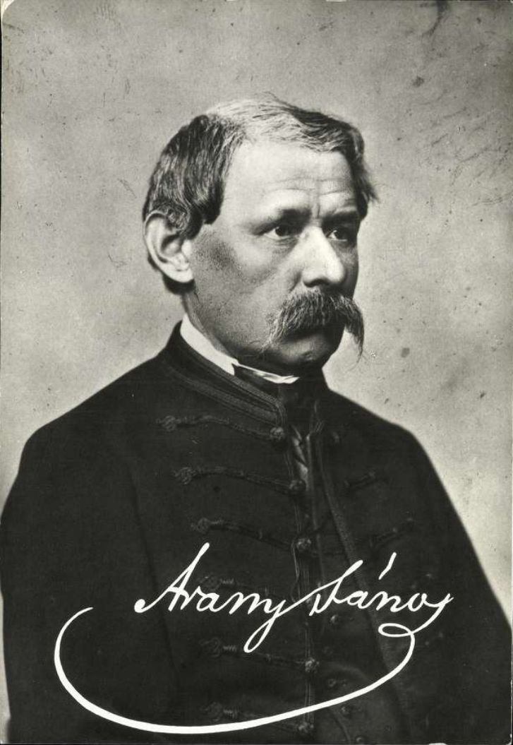 Arany János 1867-ben (Simonyi Antal felvétele)